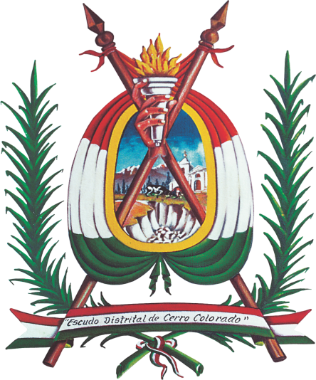 Escudo Oficial de la Municipalidad Distrital de Cerro Colorado